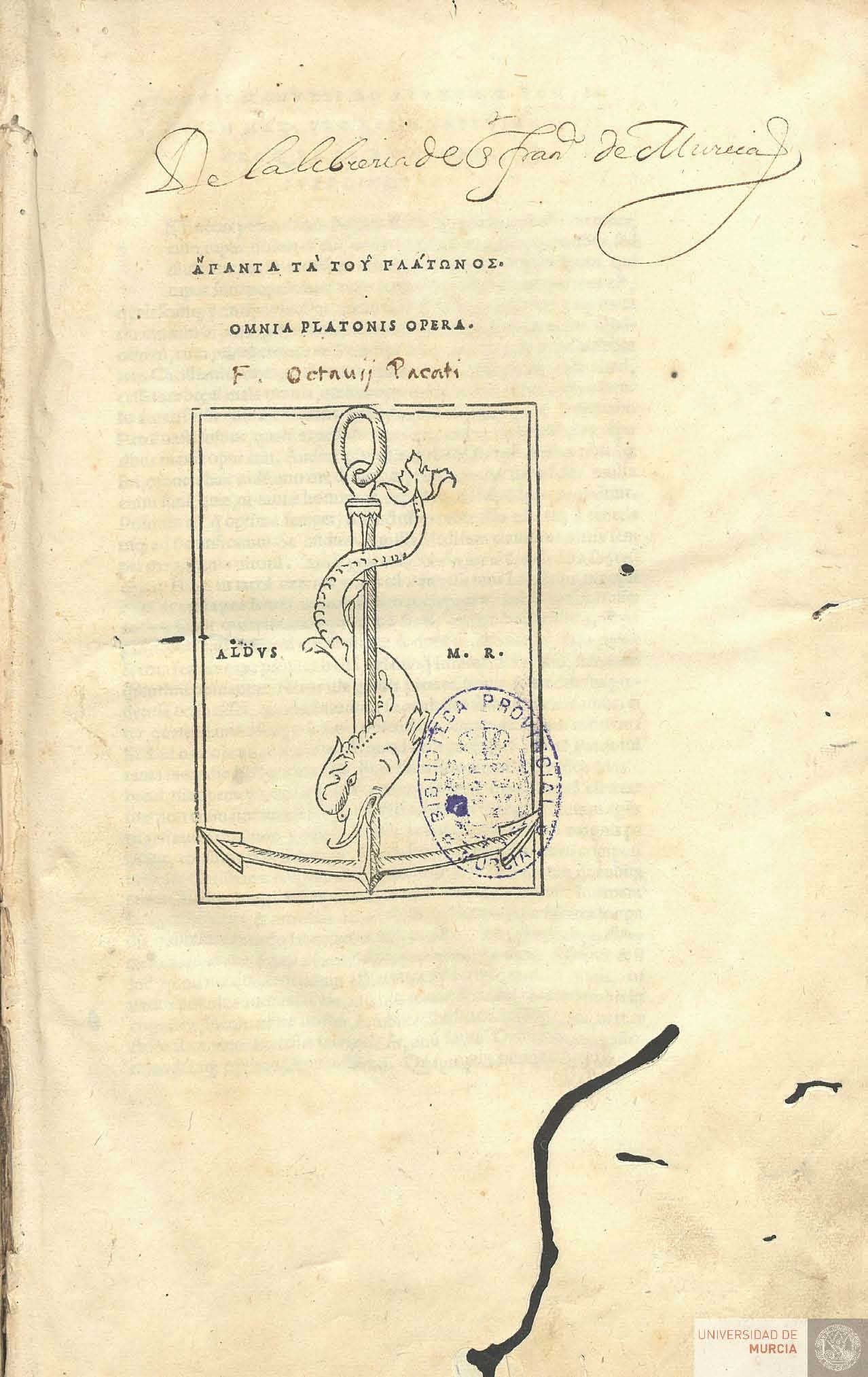 Incipit del libro Omnia Platonis Opera con la marca del impresor Aldo Manucio